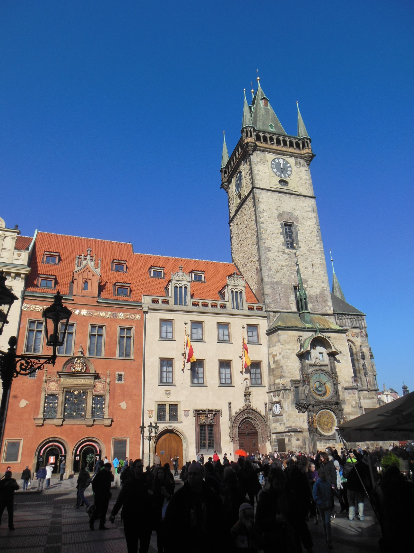 Praha-Staré Město. Staroměstská radnice na Staroměstském náměstí.